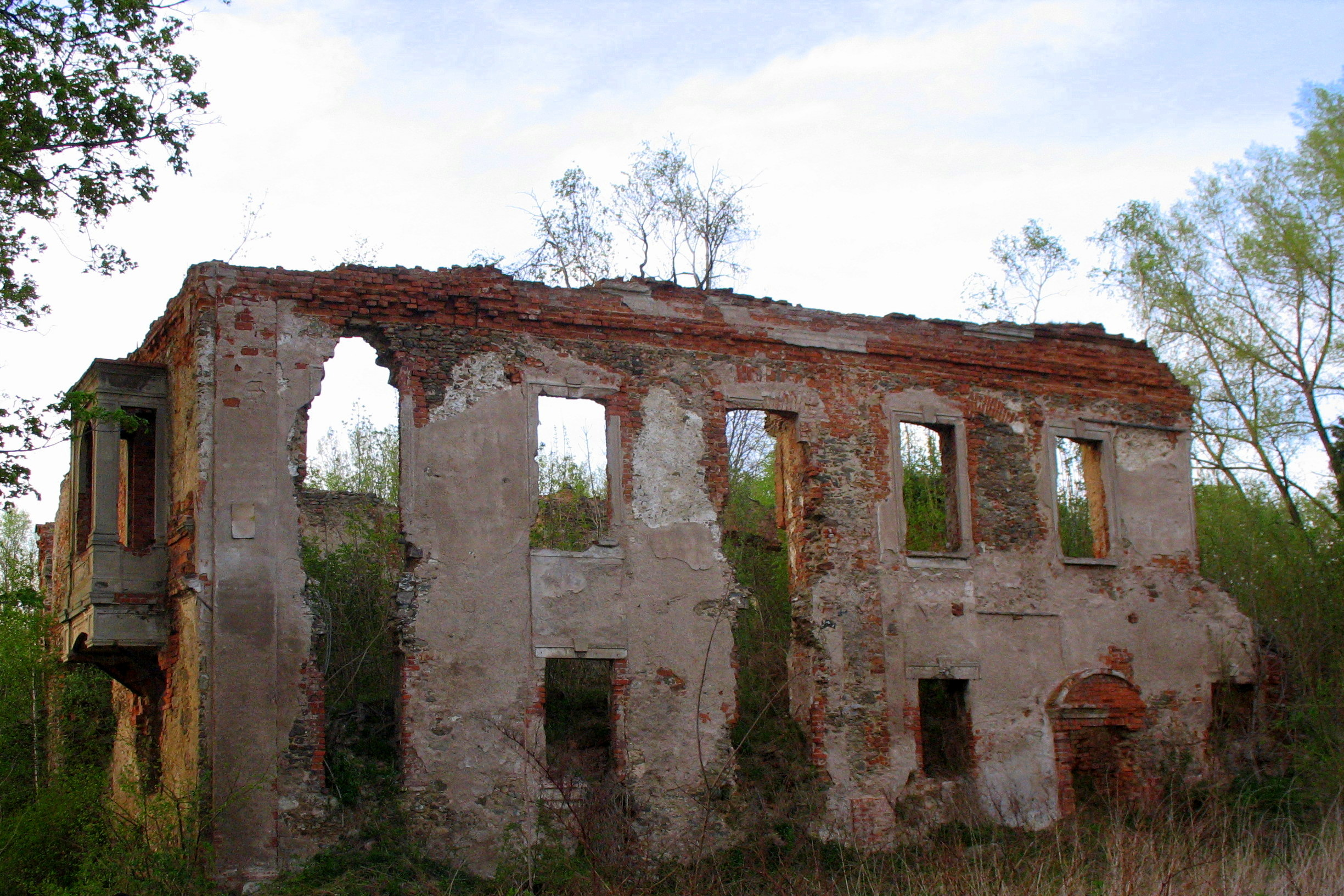 Ostroszowice - pałac, obecnie ruina (zabytek nr A/4472/1364)